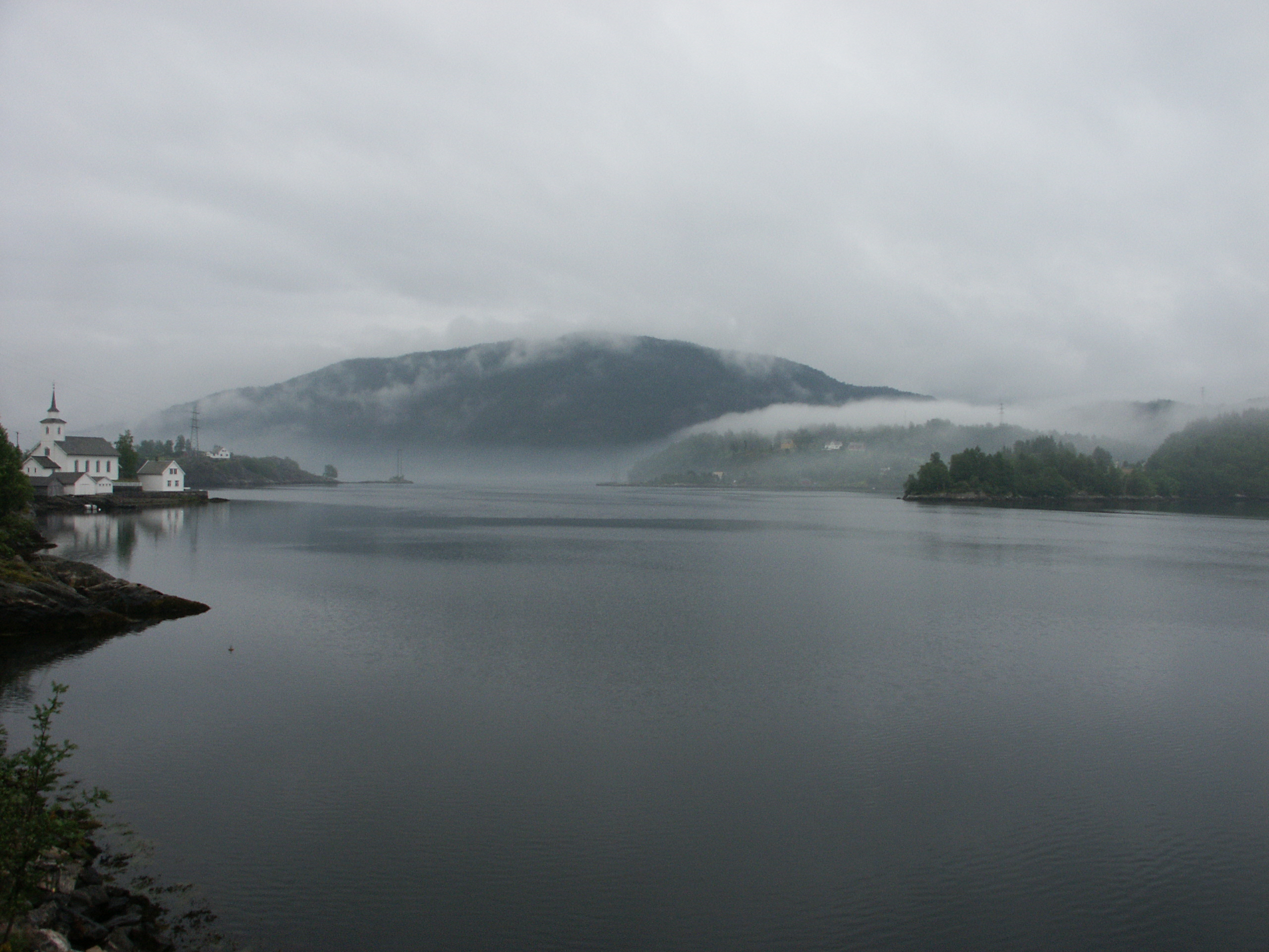 Vike kyrkje i Nordhordland